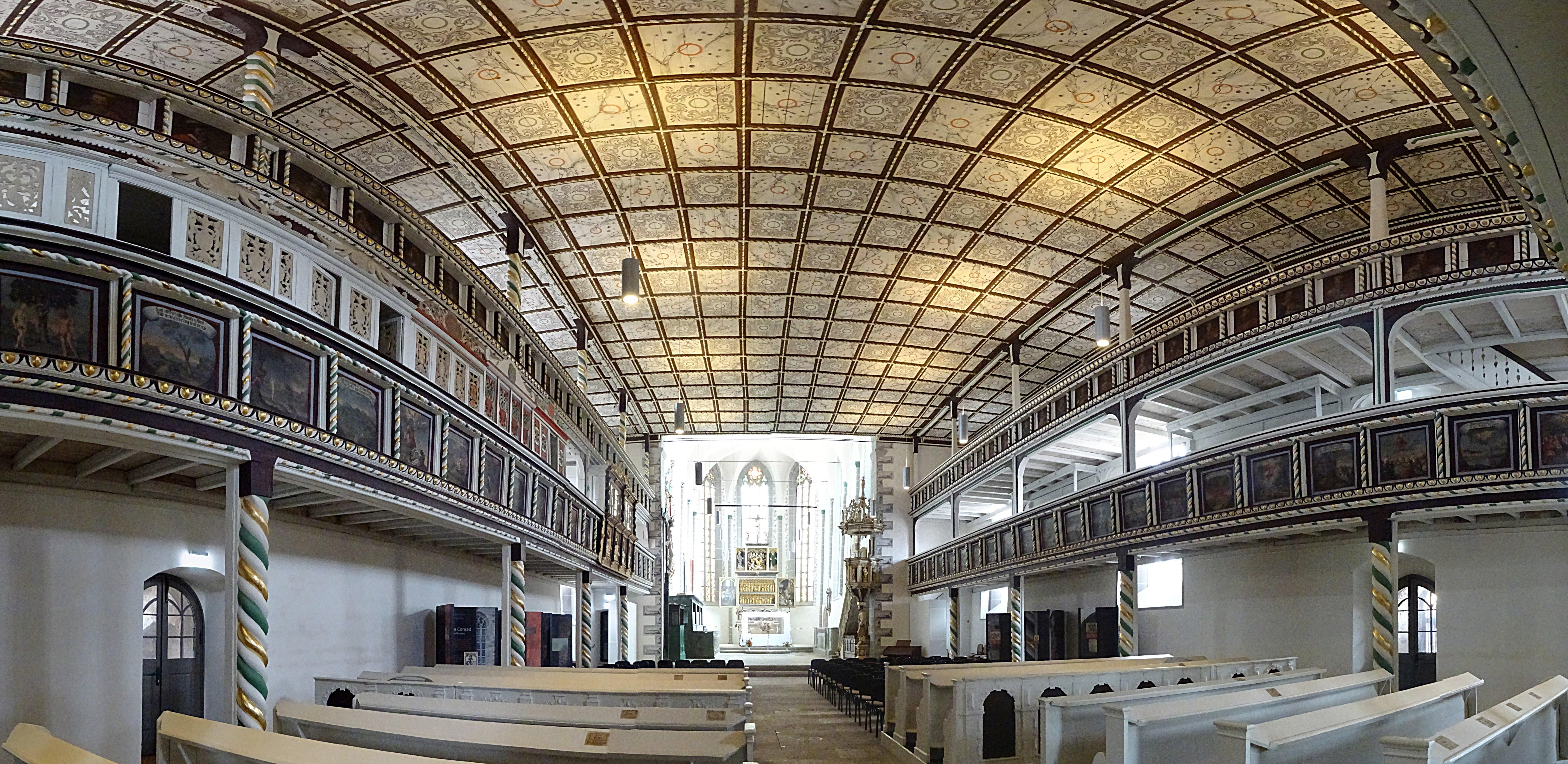 Innenraum Panorama der Stadtkirche St. Peter und Paul (Weißensee), Blick zum Altar